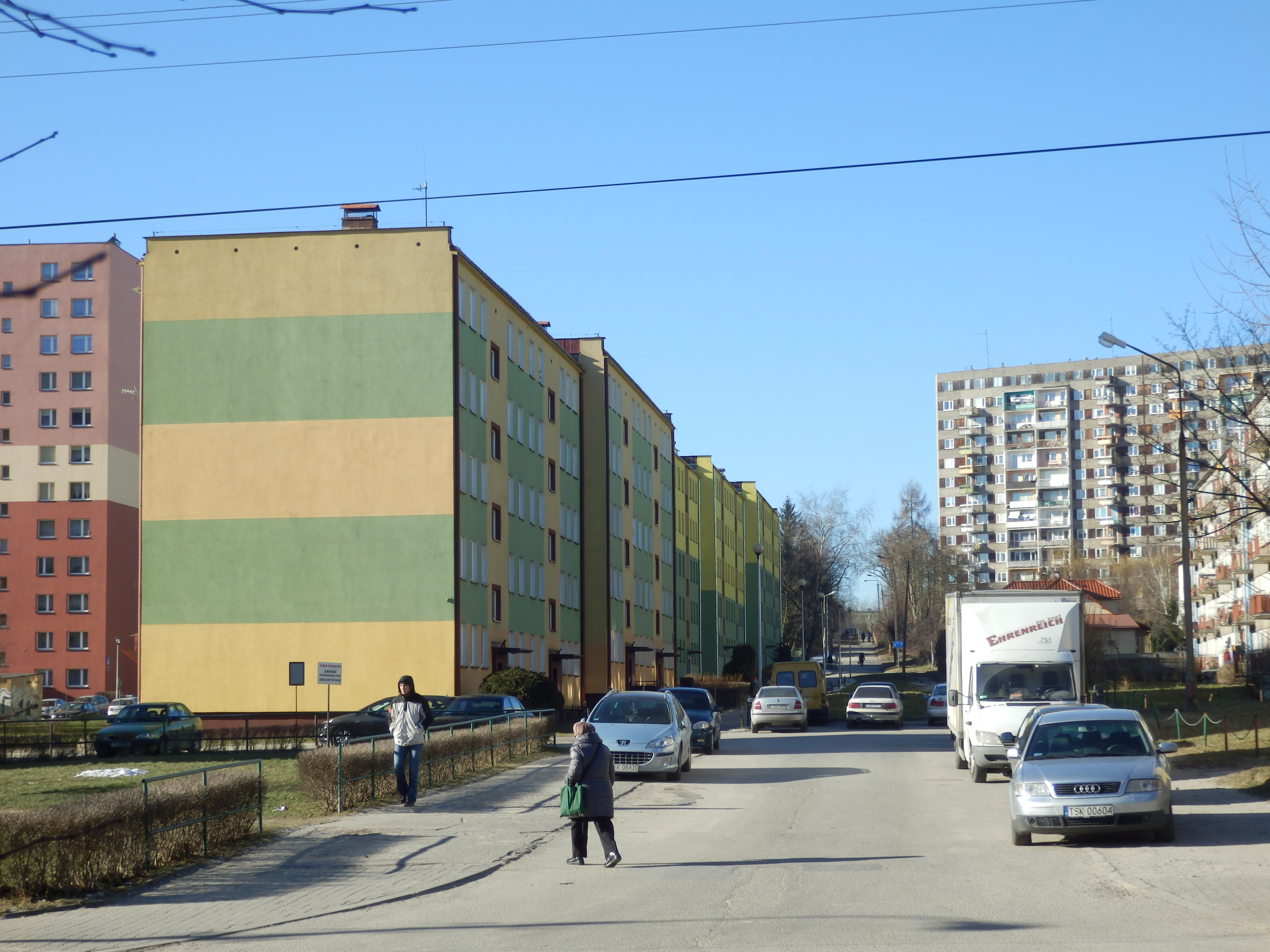 Ulica Górnicza w Skarżysku-Kamiennej